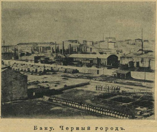 Баку. Черный город. Фото из журнала Природа и люди № 50 за 1910 год